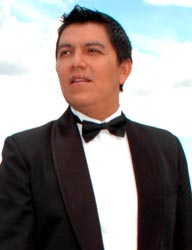 MARLON VALVERDE DE GALA MISIONARTE